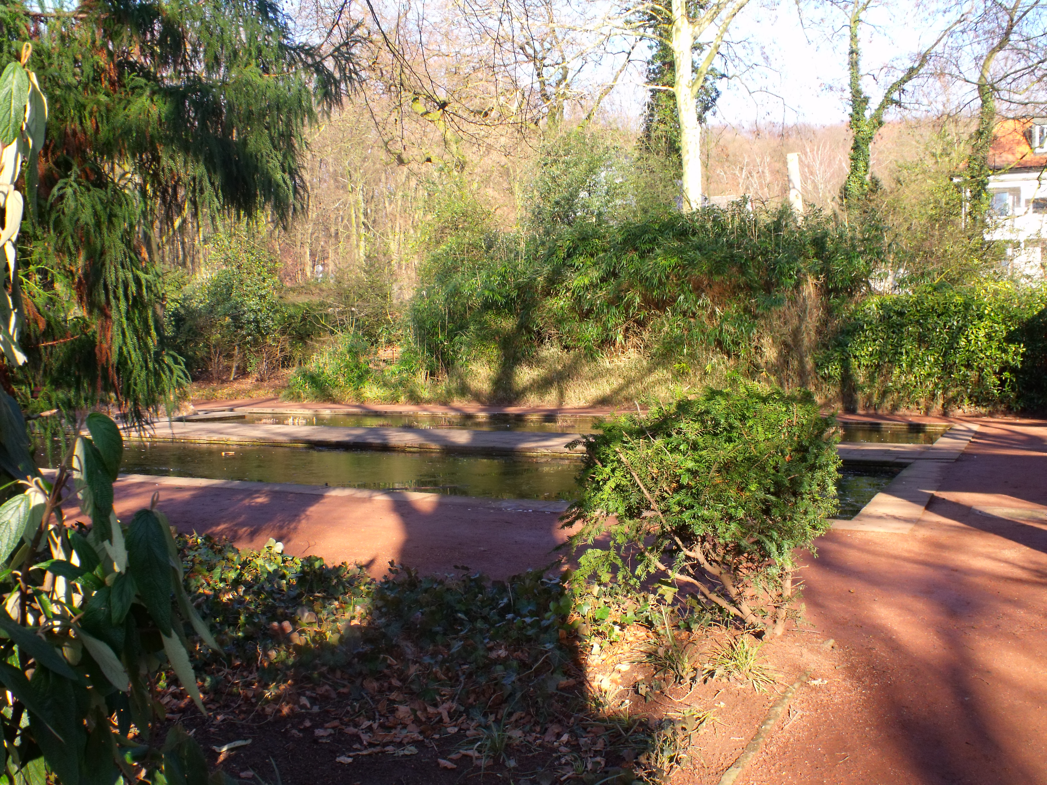 Teich im Botanischengarten Duisburg